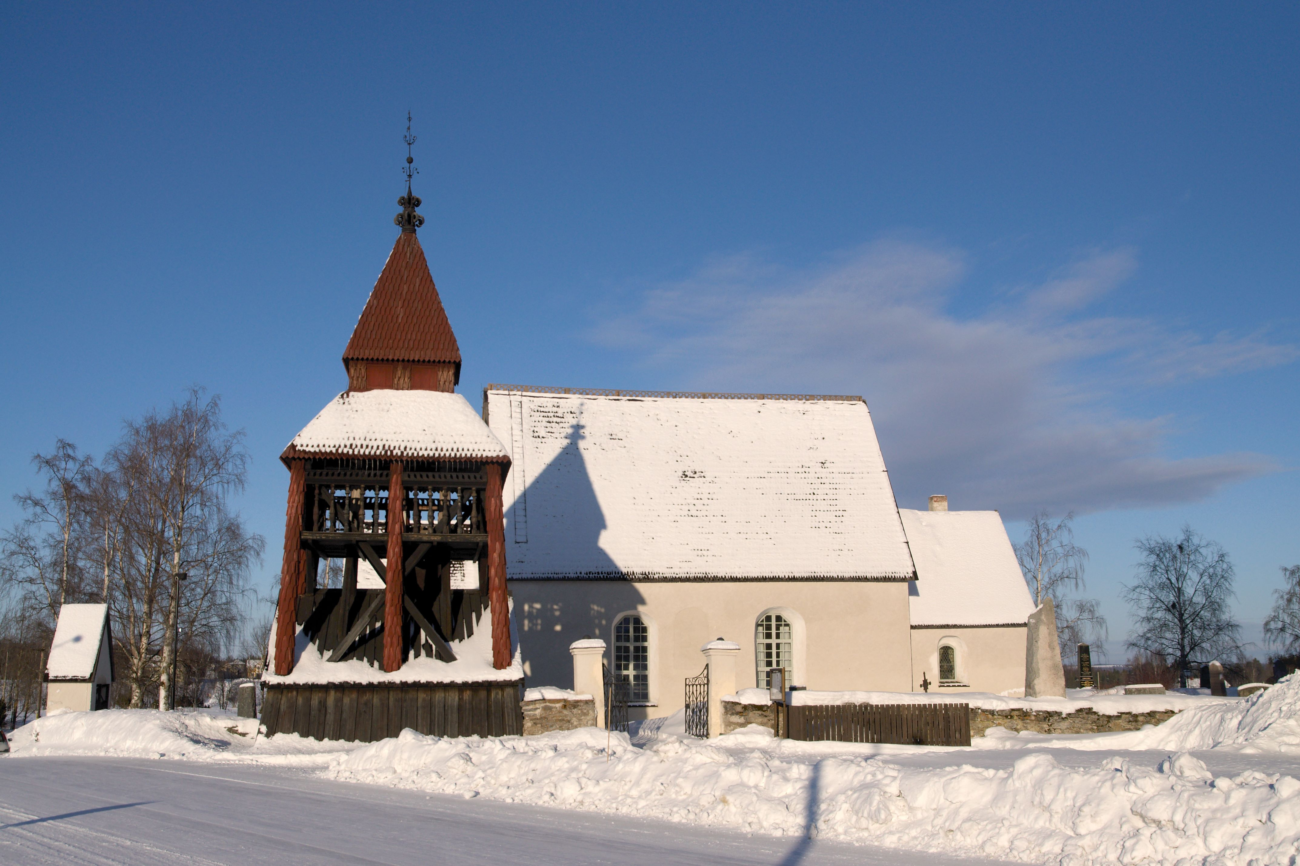 Norderö kyrka